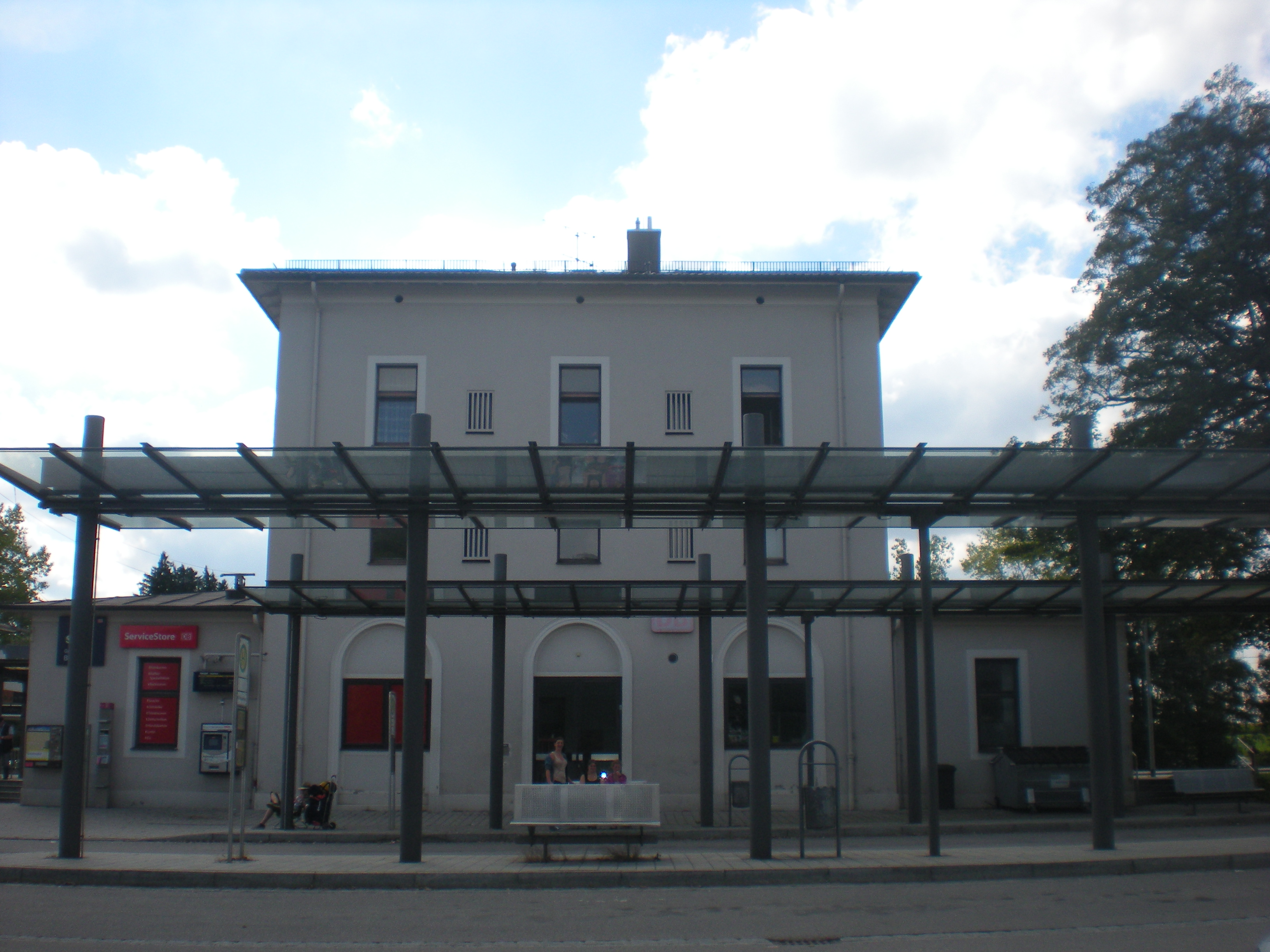 Bahnhofsgebäude des Grafinger Bahnhofs